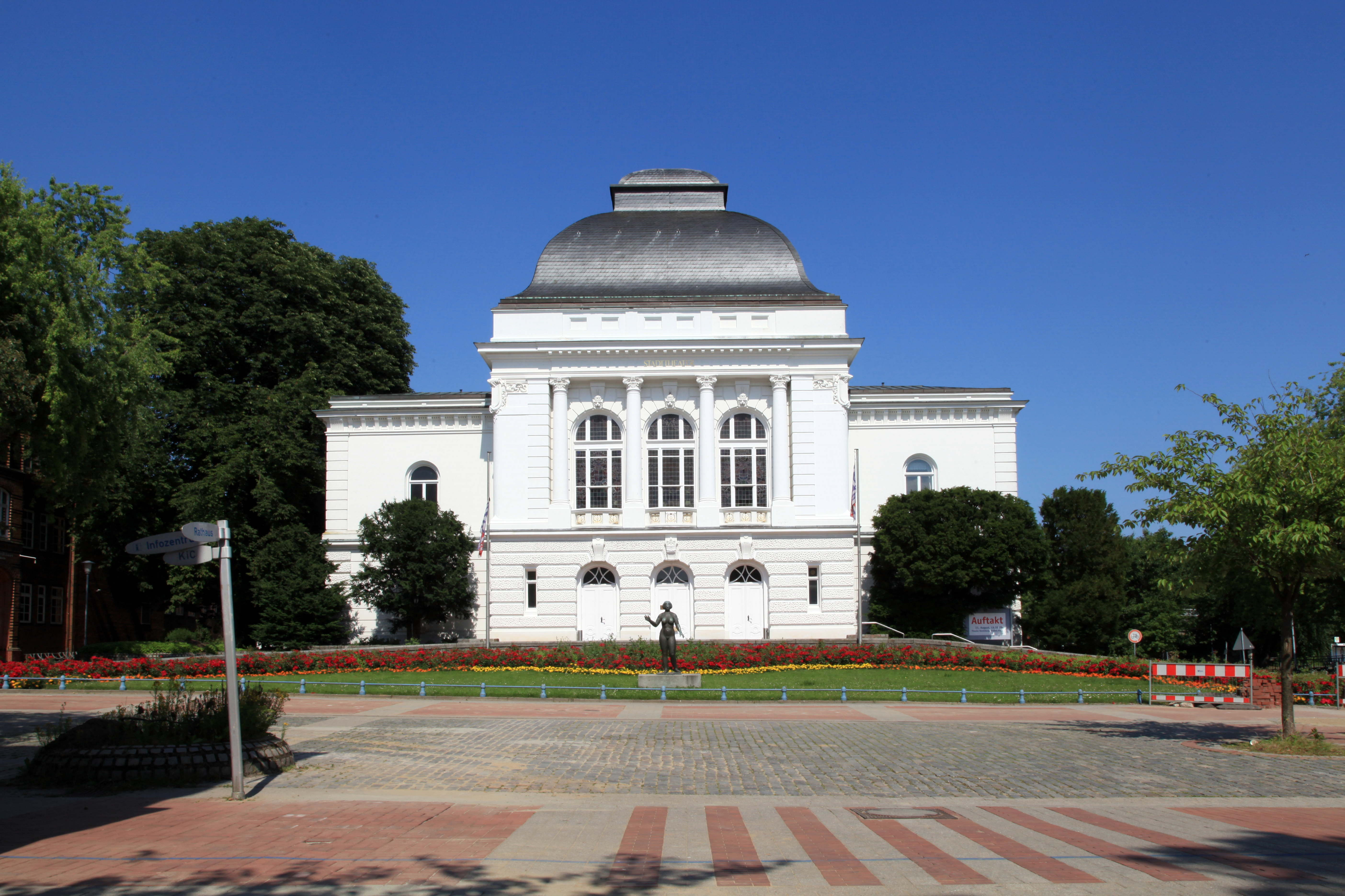 Stadttheater, Hans-Heinrich-Beisenkötter-Platz in Rendsburg